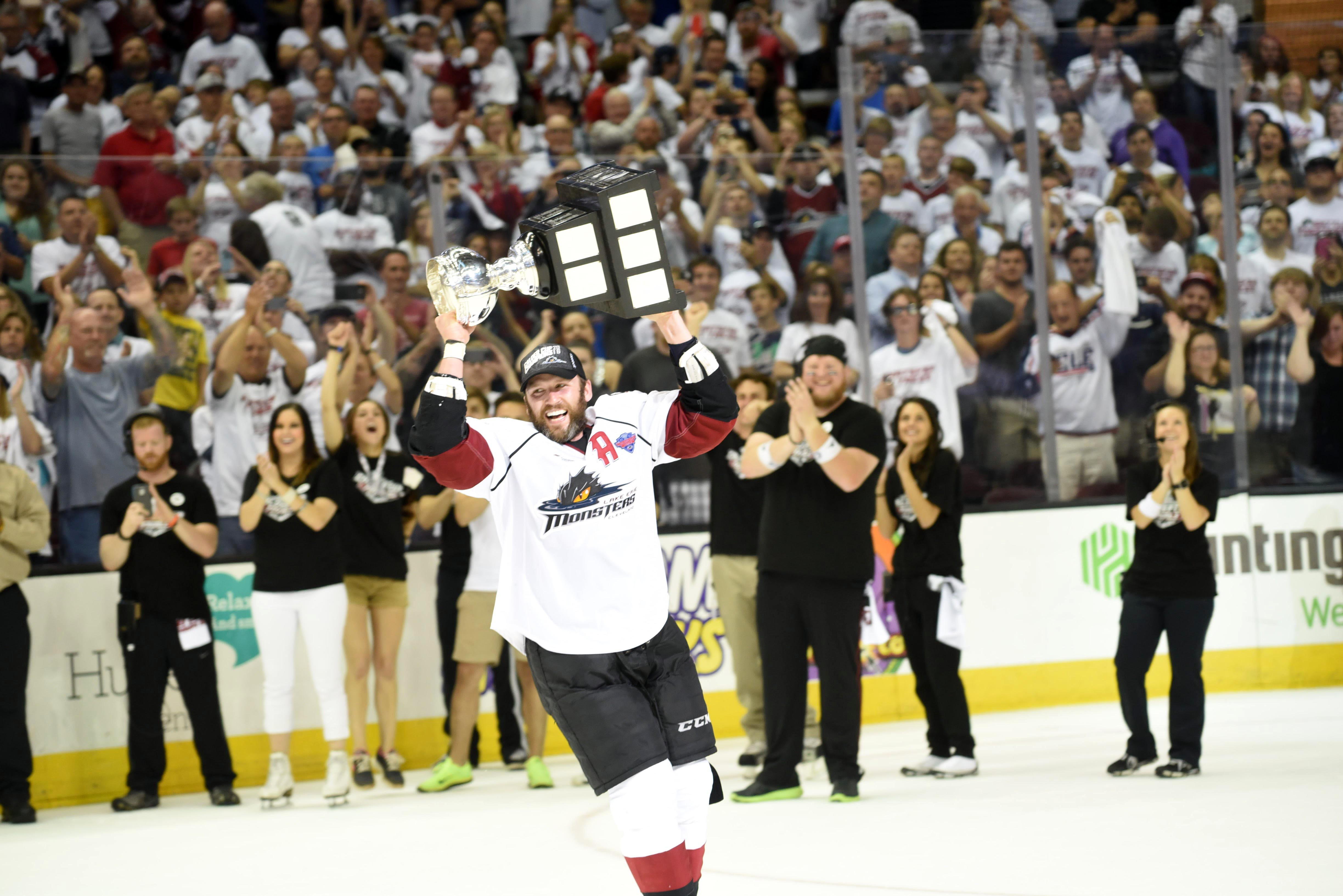 Photo: John Saraya/AHL